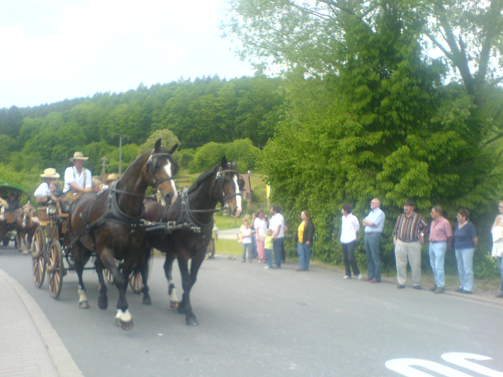 Pferde beim Gangolfsritt 2007 in Amorbach